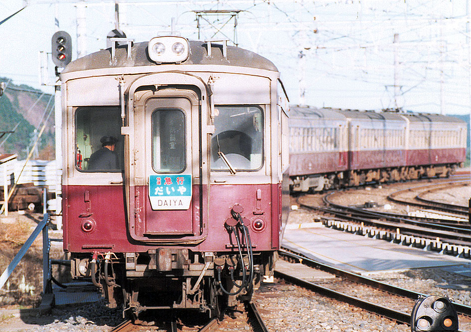 東武鉄道 5700系快速急行 だいや